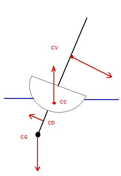 schéma illustrant la position des centre d'un voilier suivant la gite